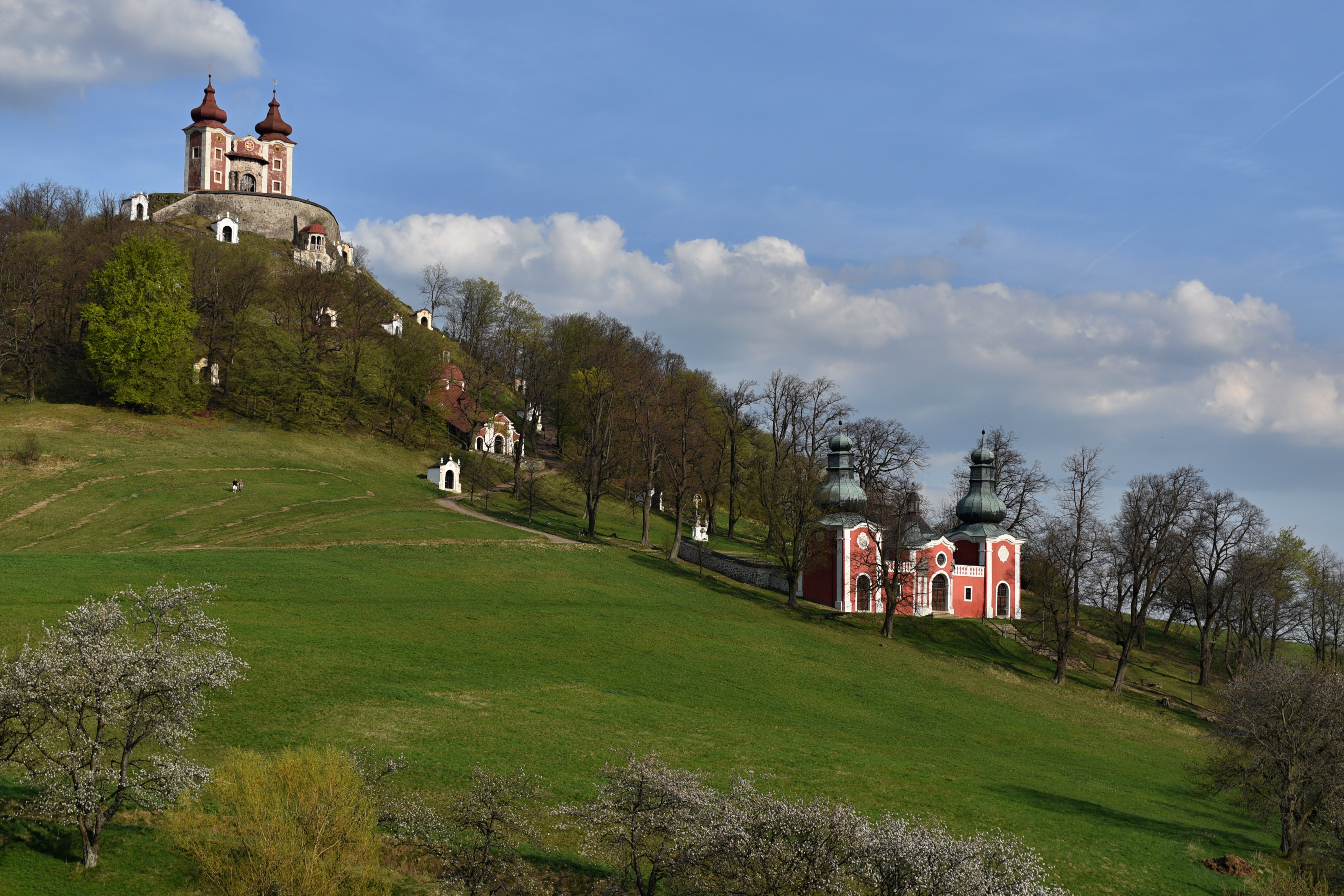 Kostol